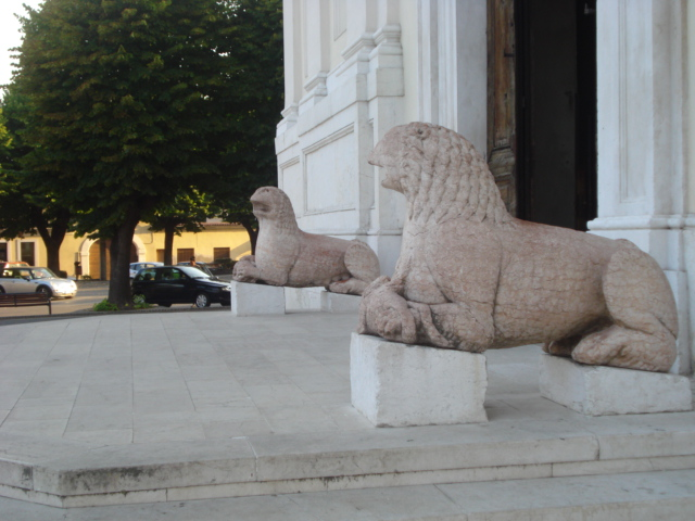 Veduta del portale d'ingresso della Parrocchiale di Leno con i due leoni marmorei